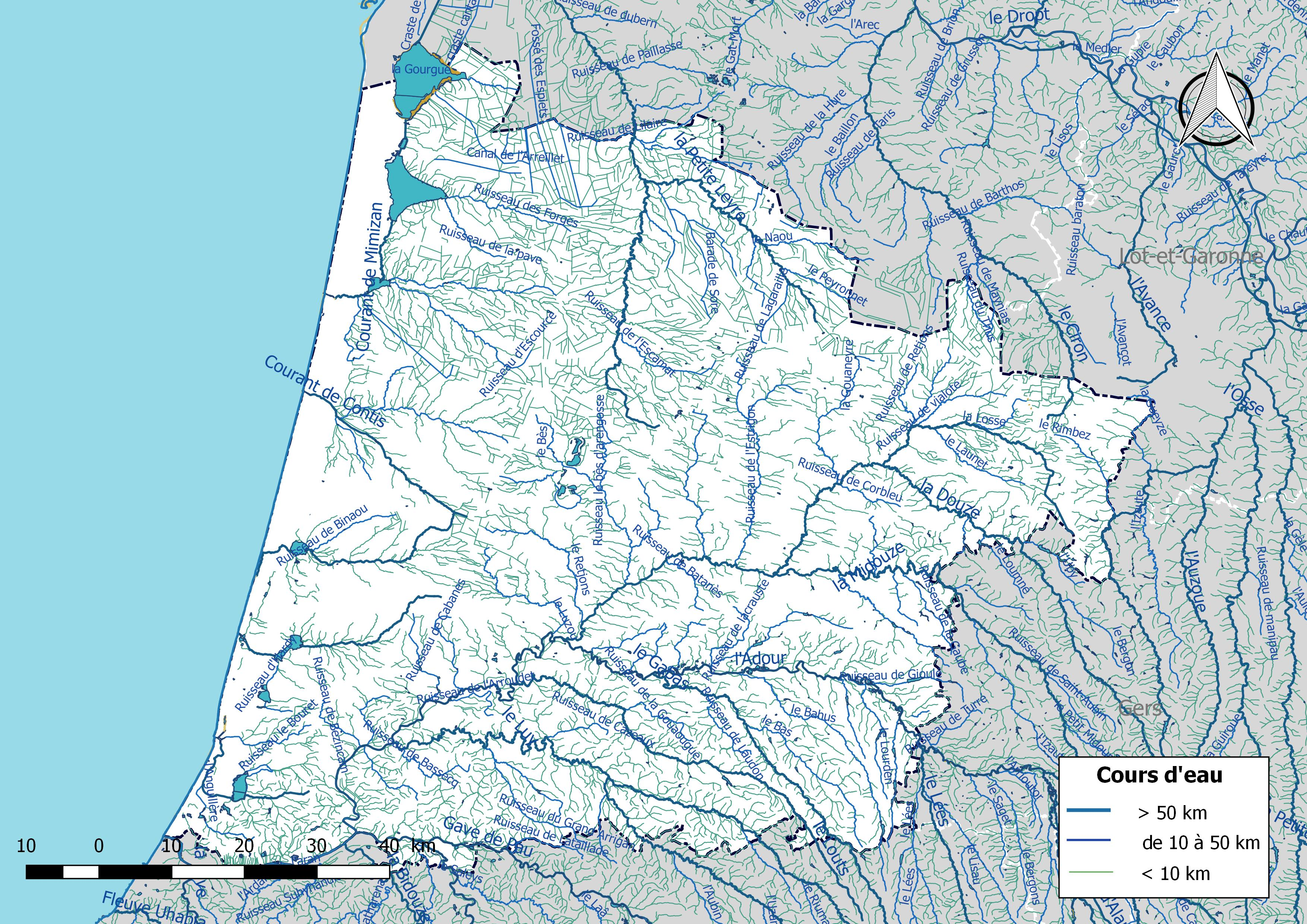 Réseau hydrographique du département des Landes (France).